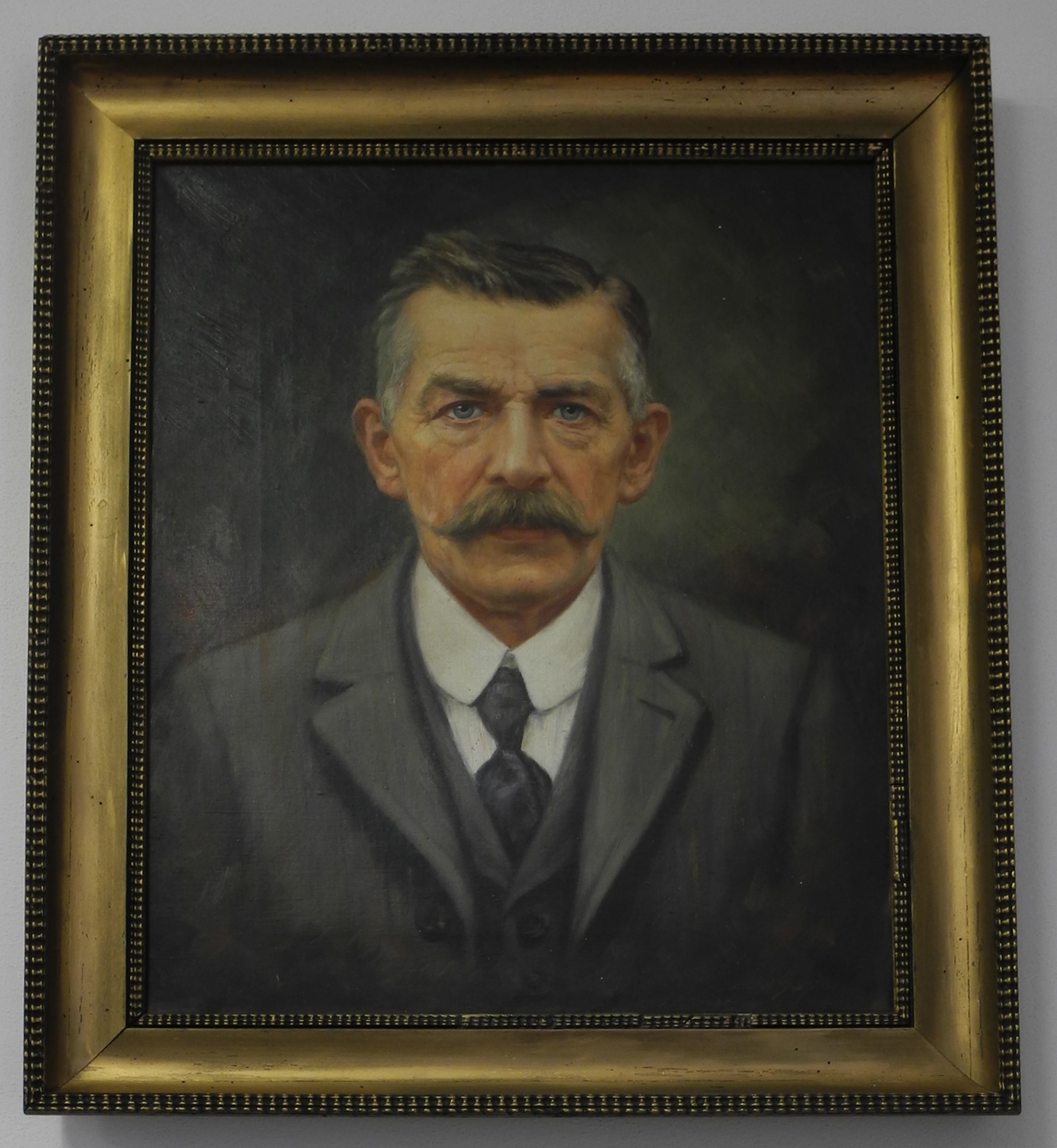 Porträt des Johann Ferdinand Karl Münzberg II. (1868–1925) vom deutsch-böhmischen Maler Wenzel Salomon (1874–1953), im Stadtmuseum Rumburk